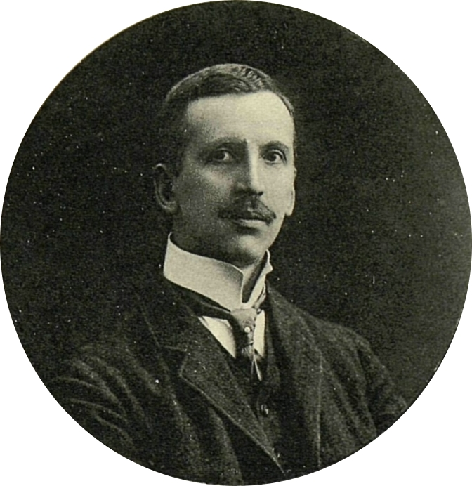 барон Ганс Фридрихович Розен, член III Государственной думы от Лифляндской губернии, член Государственного Совета по выборам.